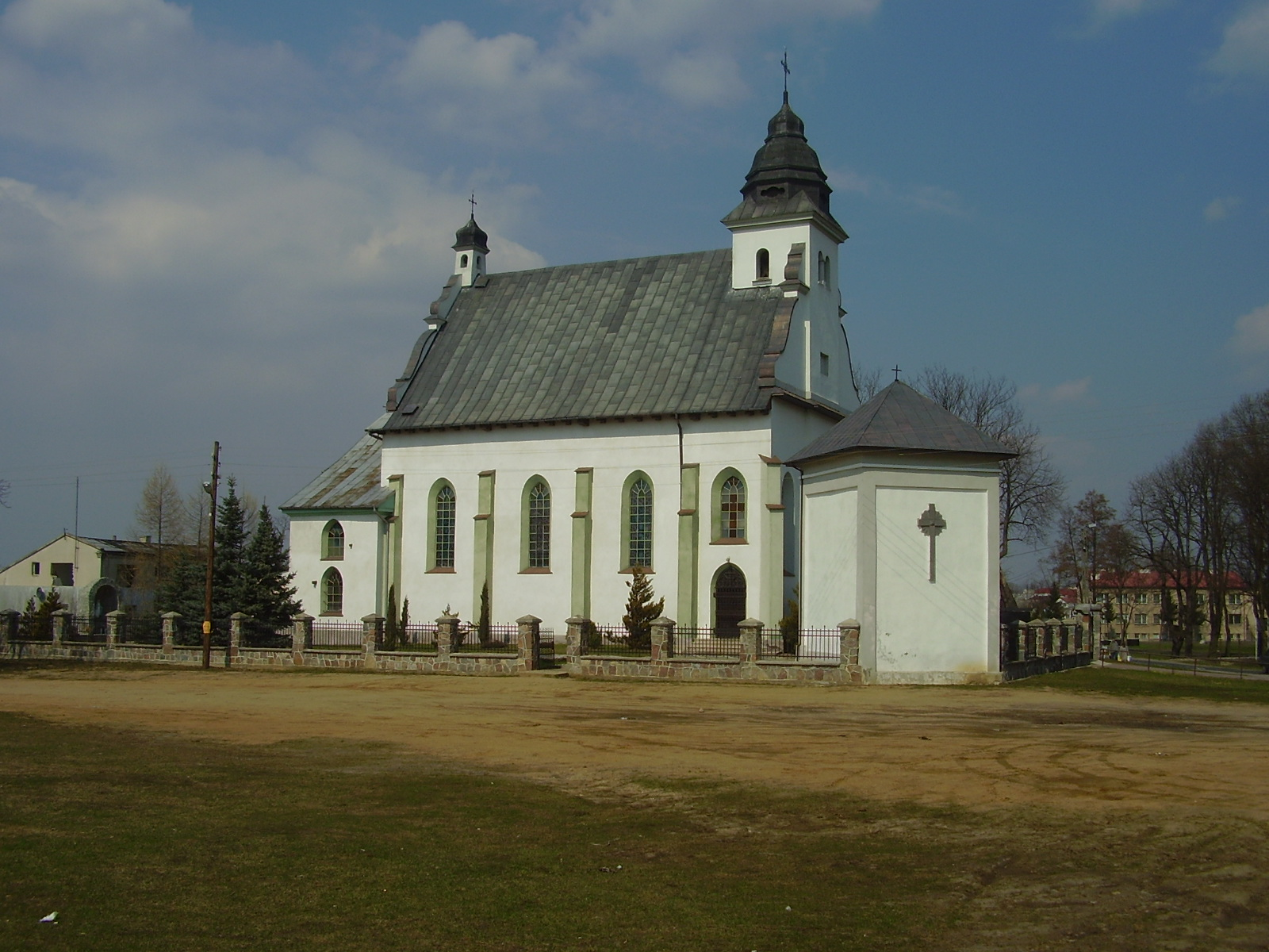 Zdjęcie kościoła w Cielądzu z 2006 roku